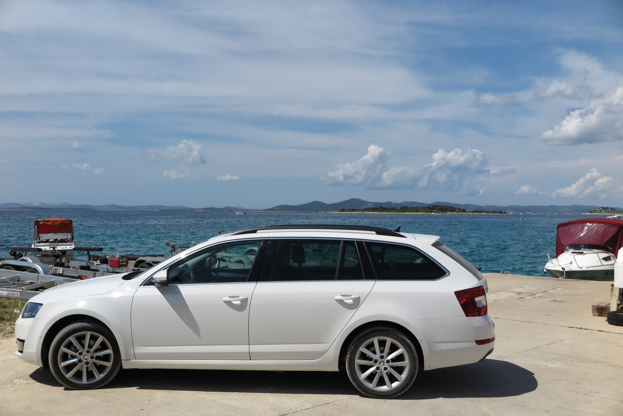 Skoda Octavica Kombi 2015 2.0 TDI Green tec, 110 kW